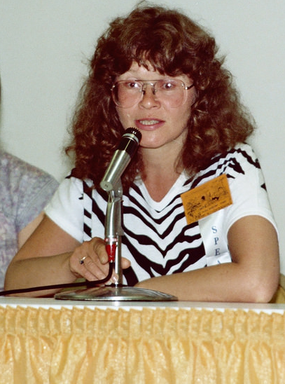 L'auteure de comics Trina Robbins en 1982 à la convention de San Diego